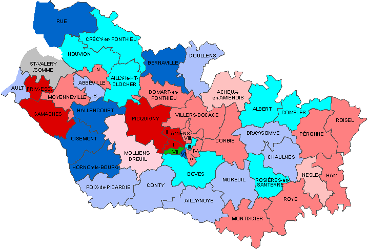 Conseillers généraux de la Somme en 2007